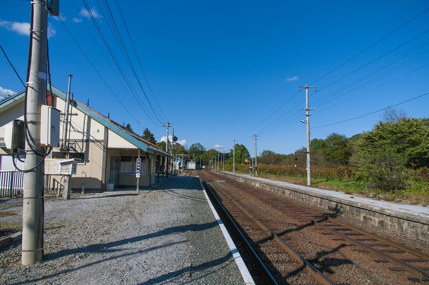 北海道旅客鉄道株式会社根室本線金山駅